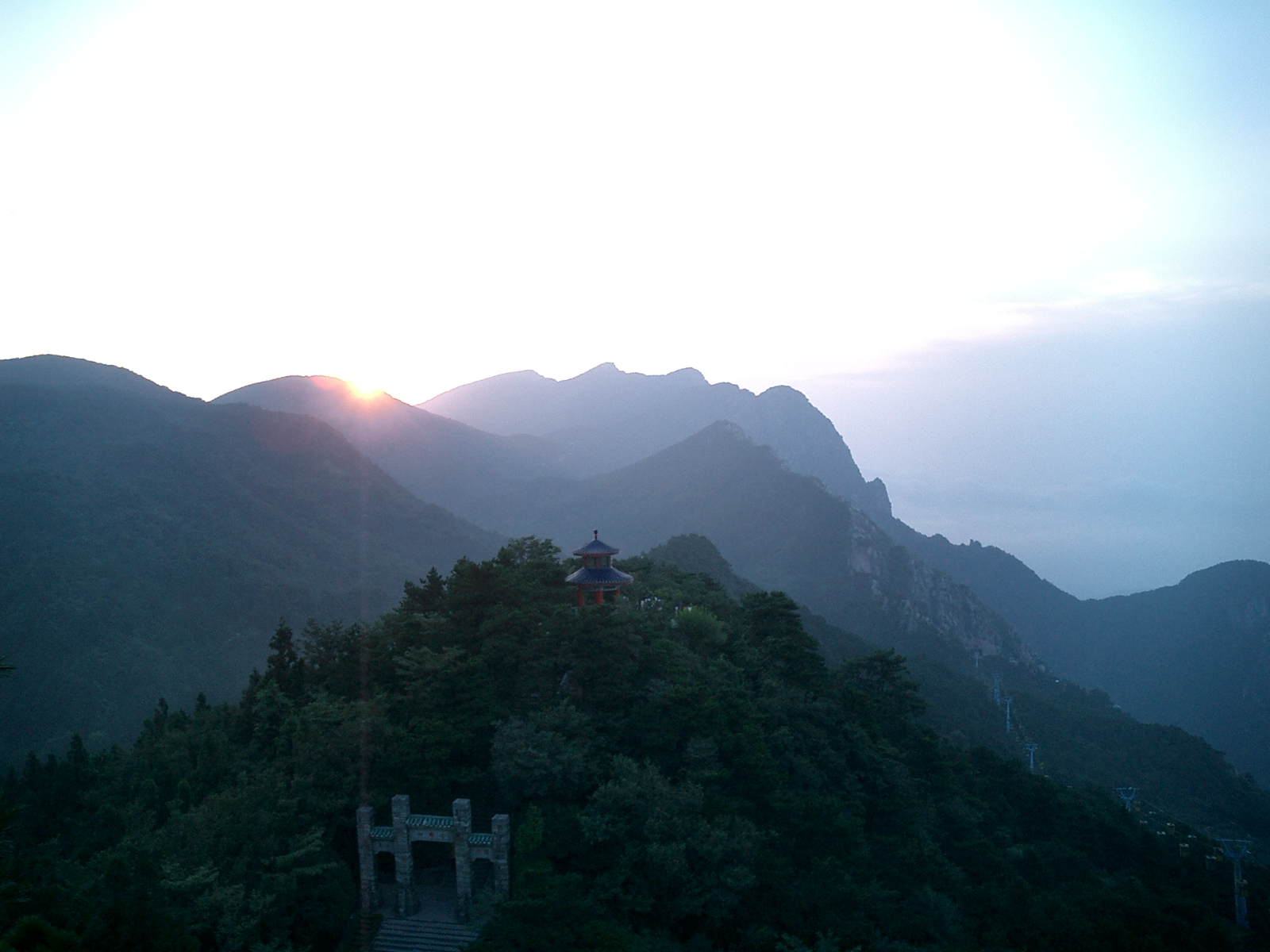 作者：陈昀 摄于 2004年8月12日早上6时3分